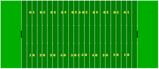 dessin de wagner51 FR:wiki GNU